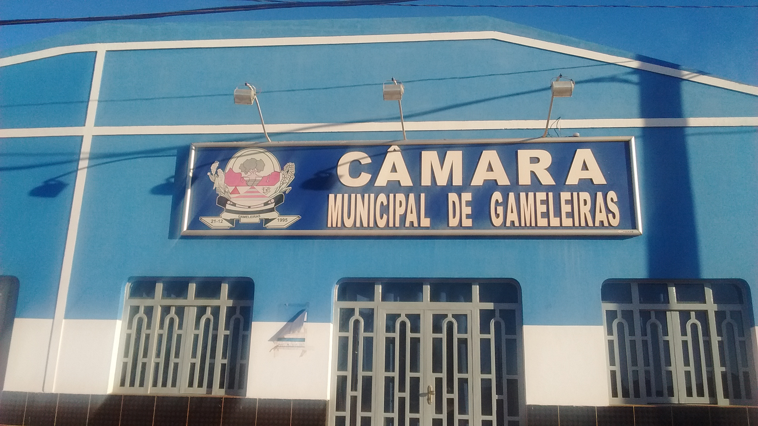 Fotografia da entrada da Câmara Municipal de Gameleiras